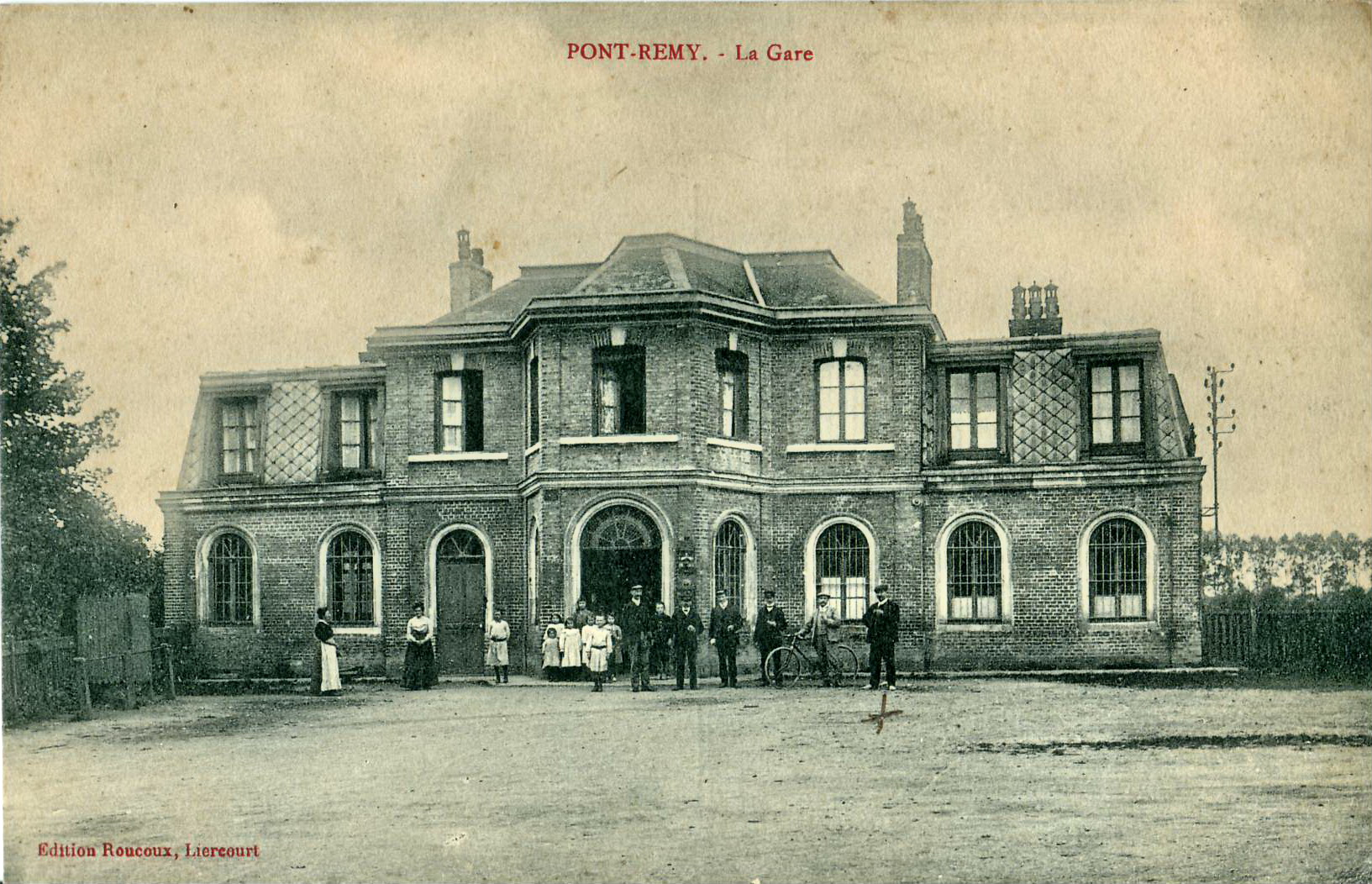 Carte postale ancienne éditée par RoucouxPont-Remy : La Gare